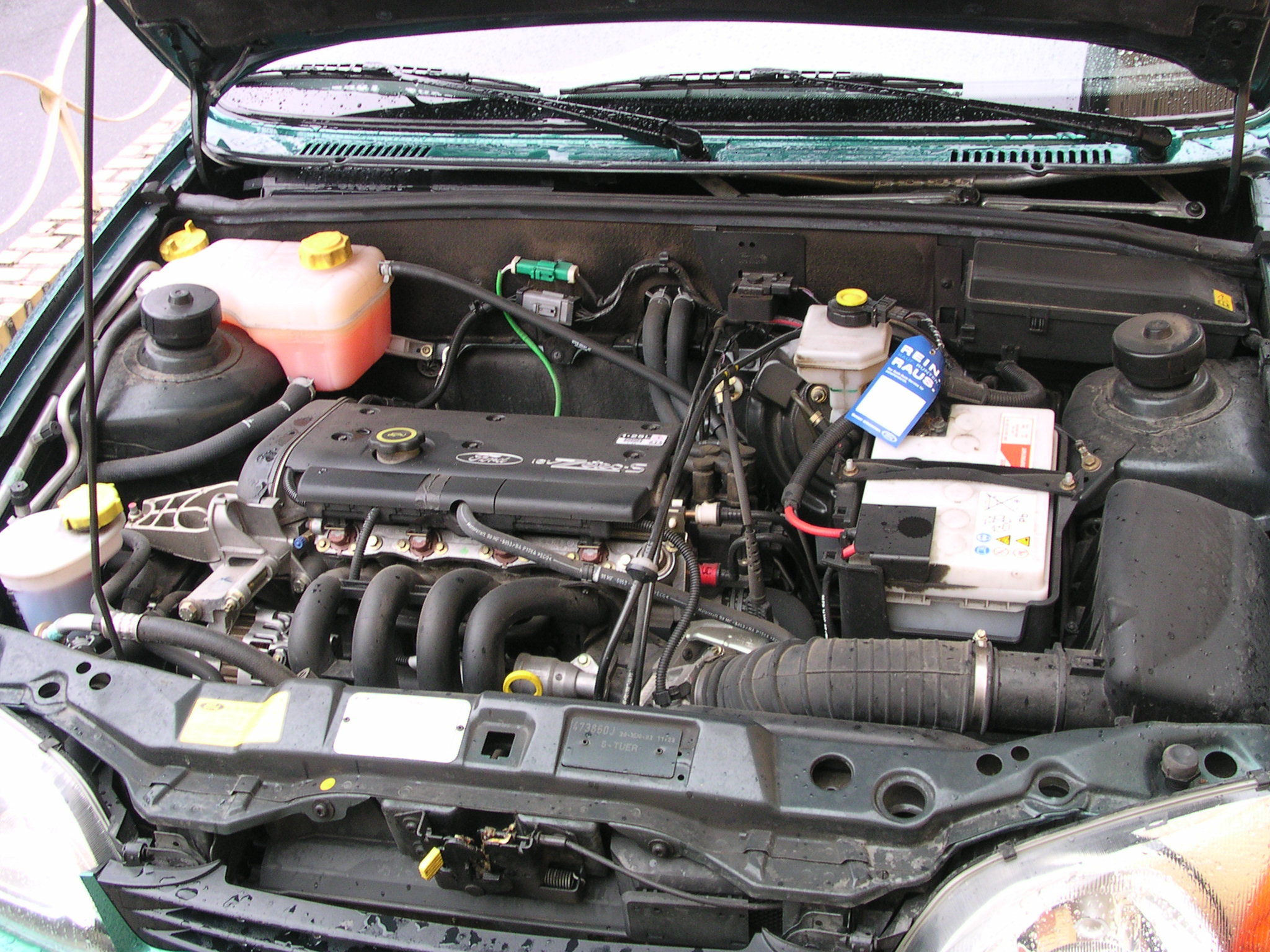 Ford Fiesta Viertürer, Baujahr 2001